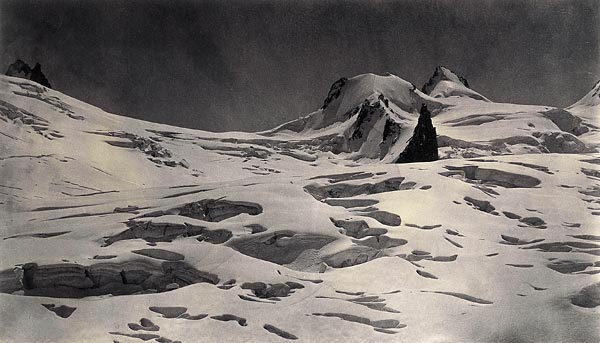 "22. Col du Géant", 1859-1860 Album Haute-Savoie. Le mont Blanc et ses glaciers. Souvenir du voyage de LL. MM. l'empereur et l'impératrice, par MM. Bisson frères photographes de Sa Majesté l'empereur. Paris, 8 rue Garancière, près Saint-Sulpice, (Paris, typographie de Henri Plon, imprimeur de l'empereur, rue Garancière, 8) [2] f.-24 f. de pl. 24 épreuves sur papier albuminé à partir de négatifs sur verre au collodion ; environ 30 x 44 cm ; cachet sec circulaire "FBF" sur l'épreuve (coin bas gauche). En dessous, le carton de montage porte le timbre humide rouge de la signature "Bisson frères" (à droite) et celui de la numérotation (à gauche). Au verso de la page de titre, table des planches. 1858-1860 Demi-reliure, maroquin vert, dos frappé du chiffre de Napoléon III et portant le titre "Bisson. Haute-Savoie" Attribution de la bibliothèque du Louvre à la bibliothèque du palais de Fontainebleau (23 octobre 1861) ; ancien D 149 / 5 Dépôt du château de Fontainebleau, Fb 21312